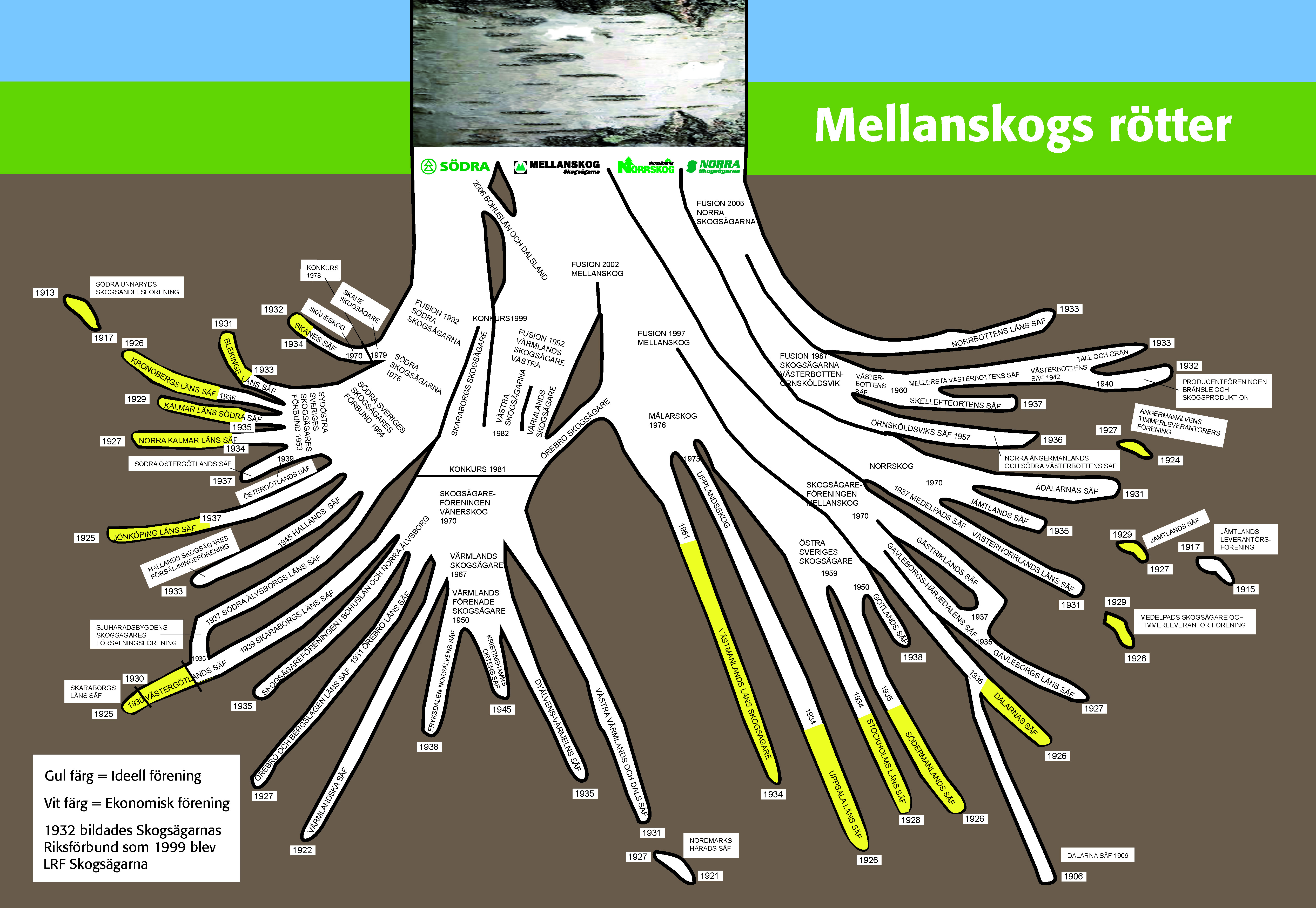 Mellanskogs historia.